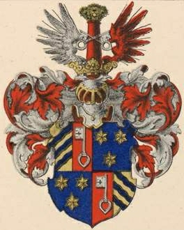 Osten gen. Sackeni suguvõsa aadli- ja parunivapp